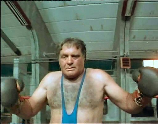 Screenshot dal film Il casinista